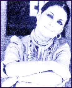 Encuadra en los términos de la ley 11723 para la República Argentina.